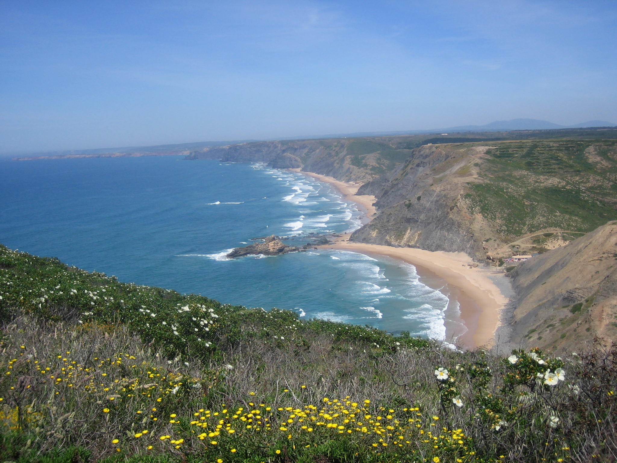 Castelejostrand bei Vila do Bispo im Parque Natural do Sudoeste Alentejano e Costa Vicentina